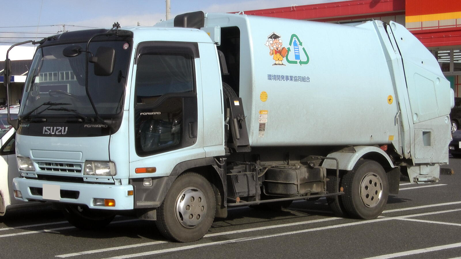 いすゞ・フォワード（4代目・ゴミ収集車仕様）